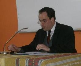 Laurent Fels à l'Abbaye Saint-Maurice de Clervaux (colloque "Jean Kobs")